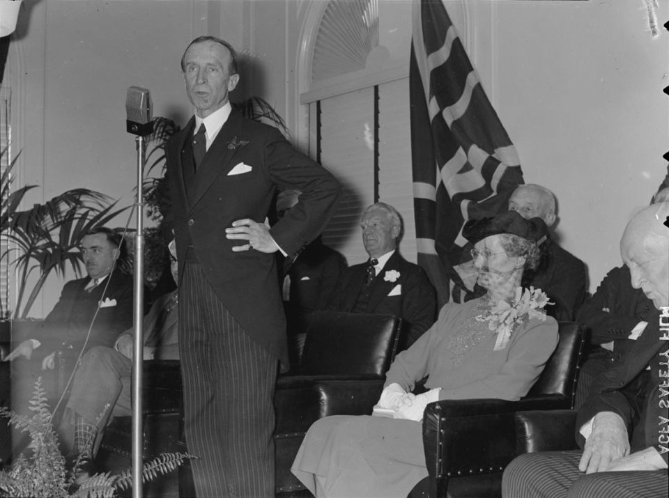 Lord John Buchan Tweedsmuir d'Elsfield, gouverneur général du Canada, parlant au micro sur une tribune officielle, lors de sa visite dans un centre de convalescence à Montréal.